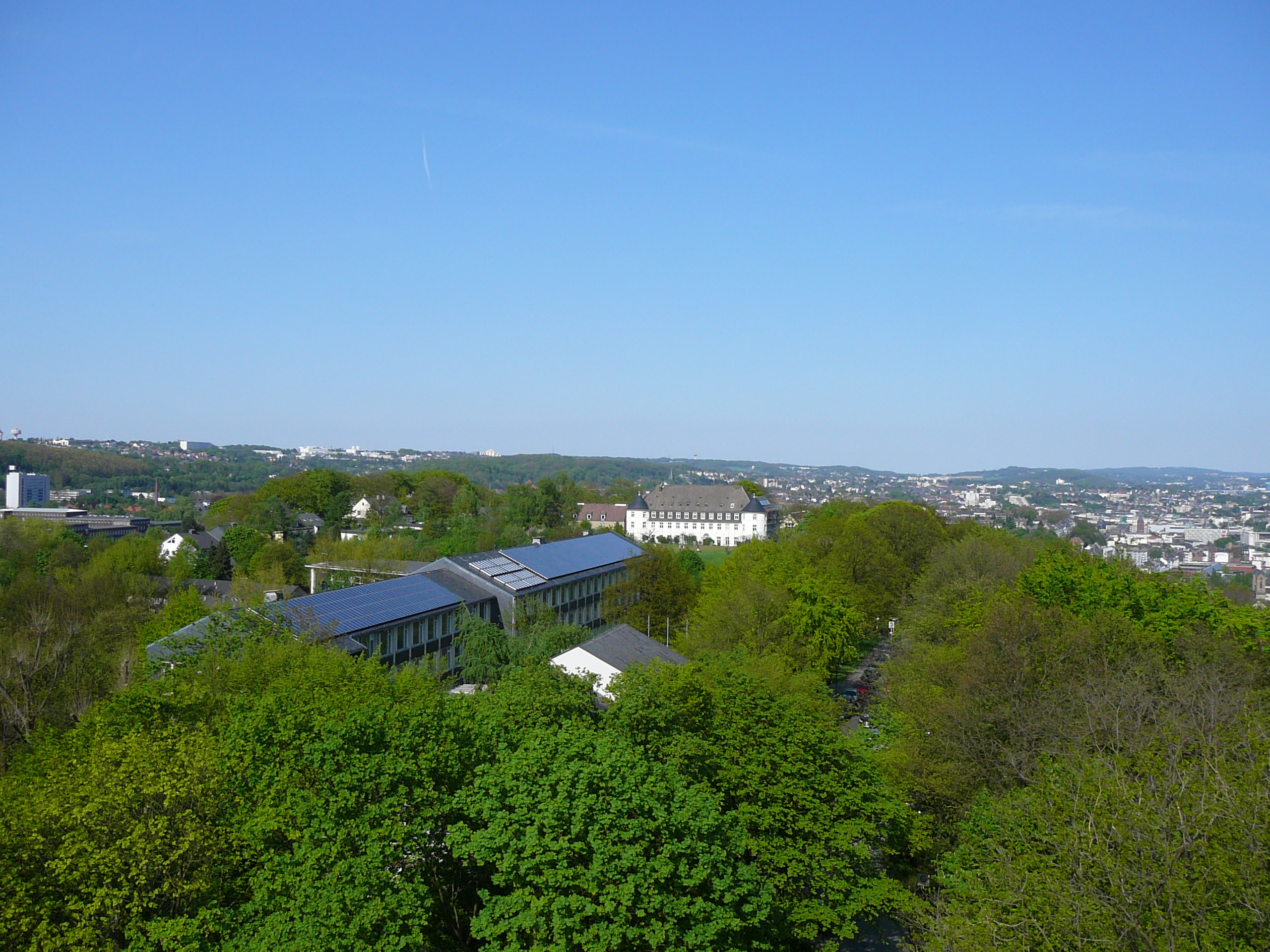 Hardt-Anlagen, Wuppertal